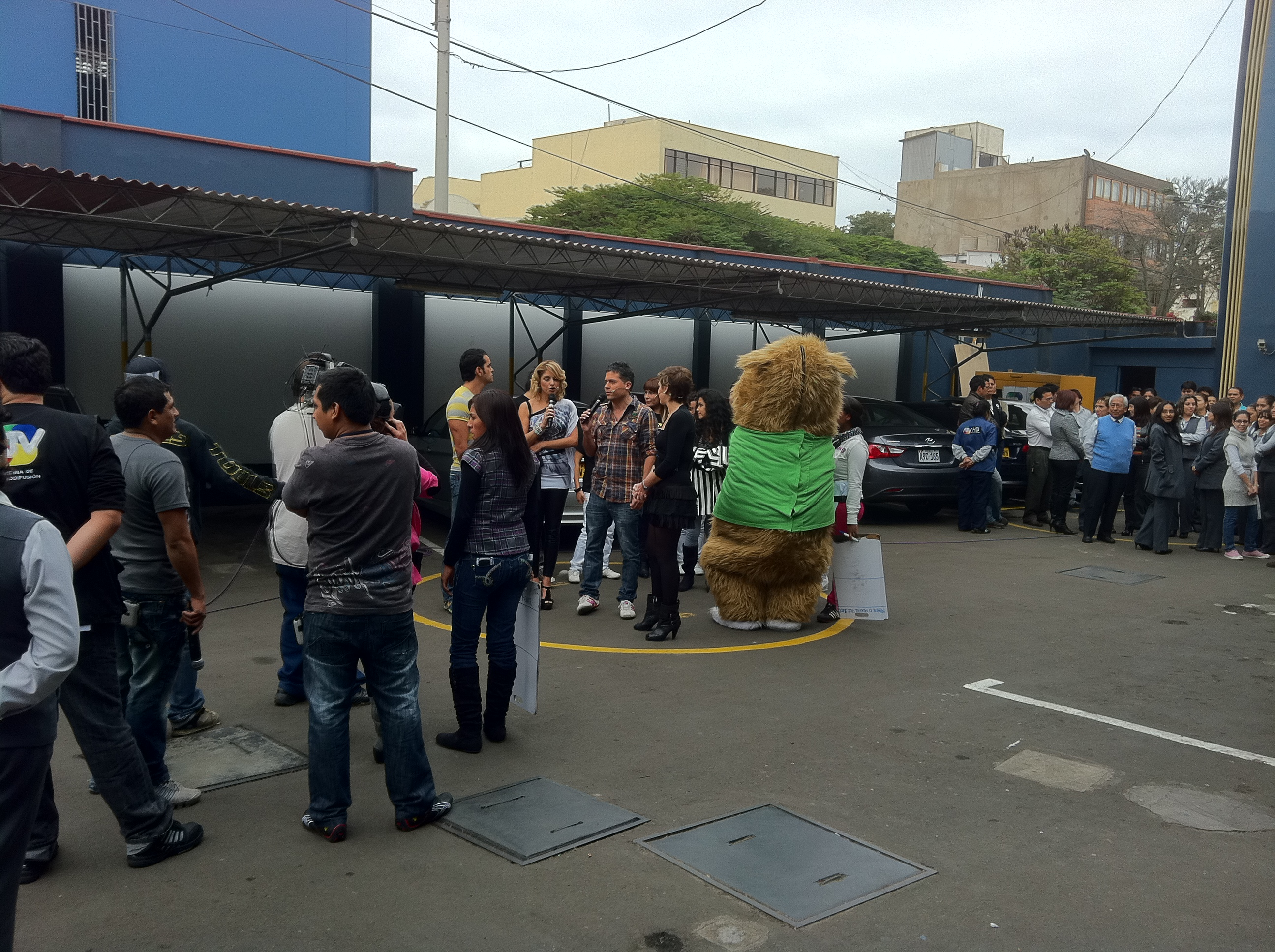 Elenco de Hola a todos durante un simulacro de sismo en las afueras de ATV.